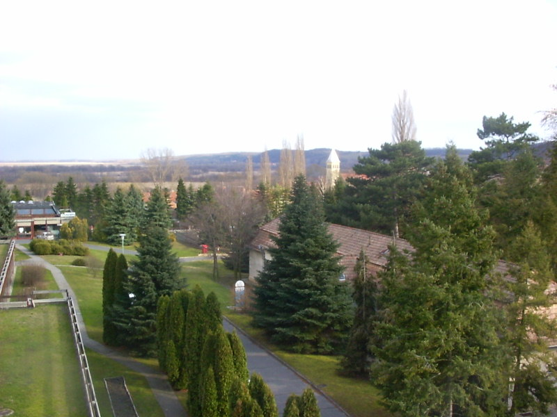 A Gyógyfürdőkórház parkja a szanatórium szobájából nézve (Balf, Sopron)